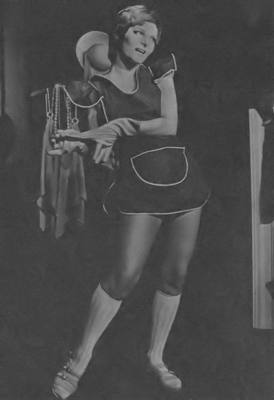 La actriz Claudia Lapacó en su unipersonal de 1974 Ódienme o quiéranme. Revista Siete Días Ilustrados, 15 de julio de 1974.